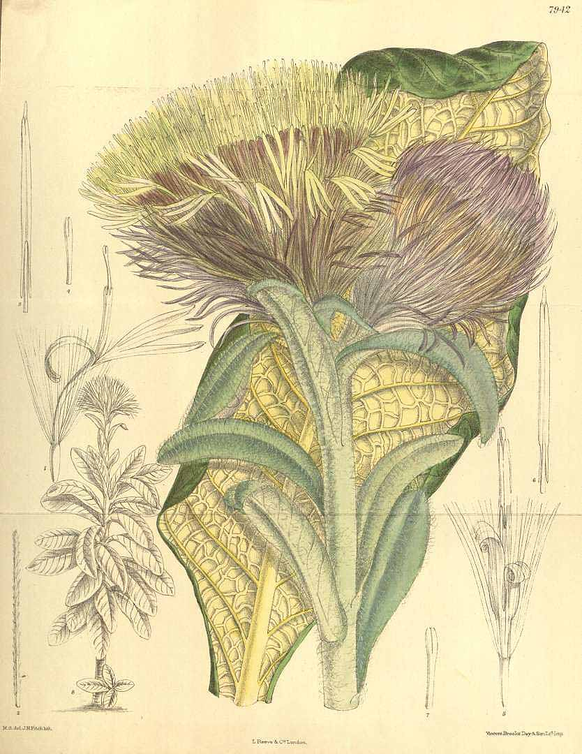 Oldenburgia grandis